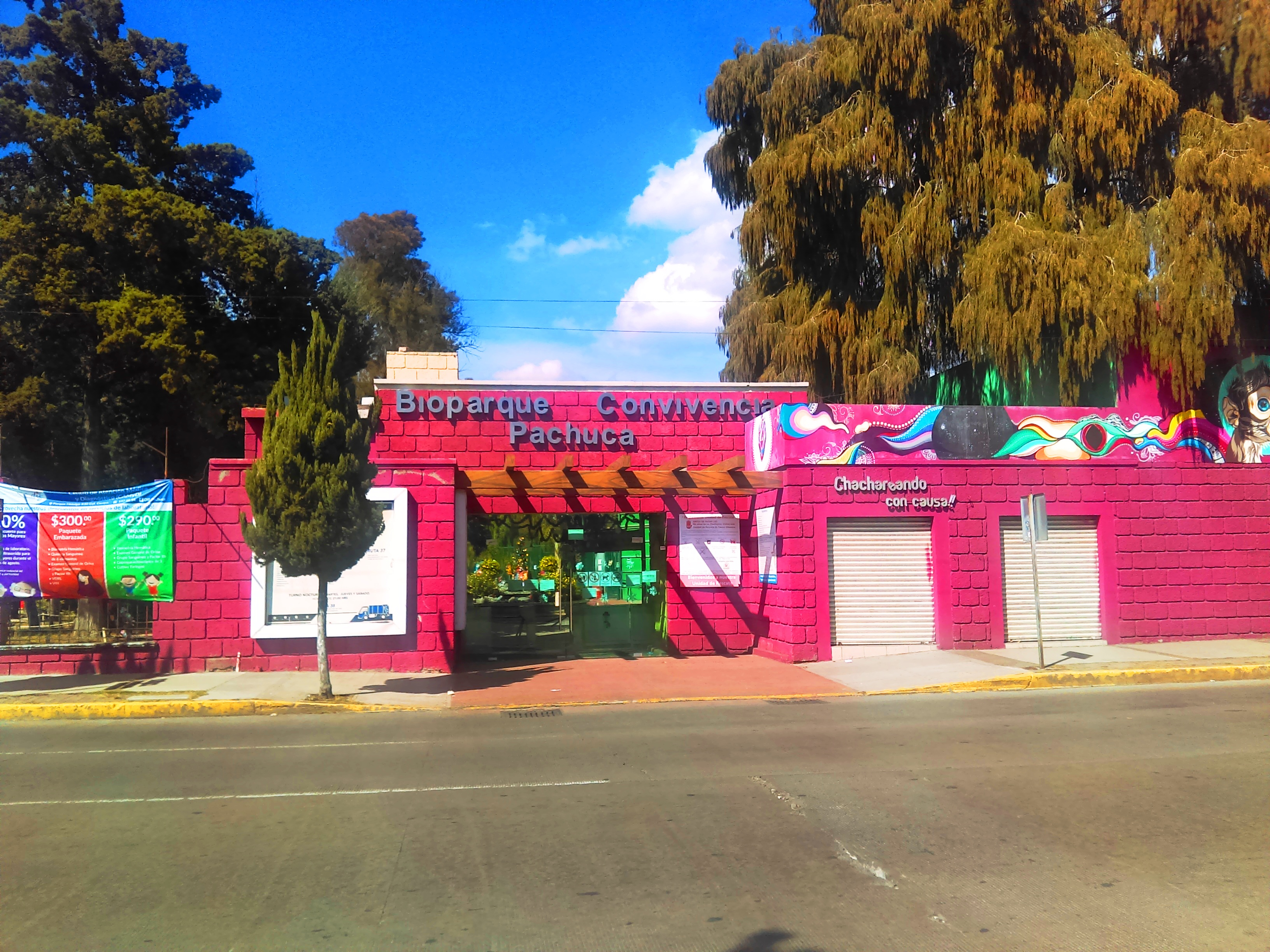 Bioparque de Convivencia en Pachuca, Hidalgo, México.